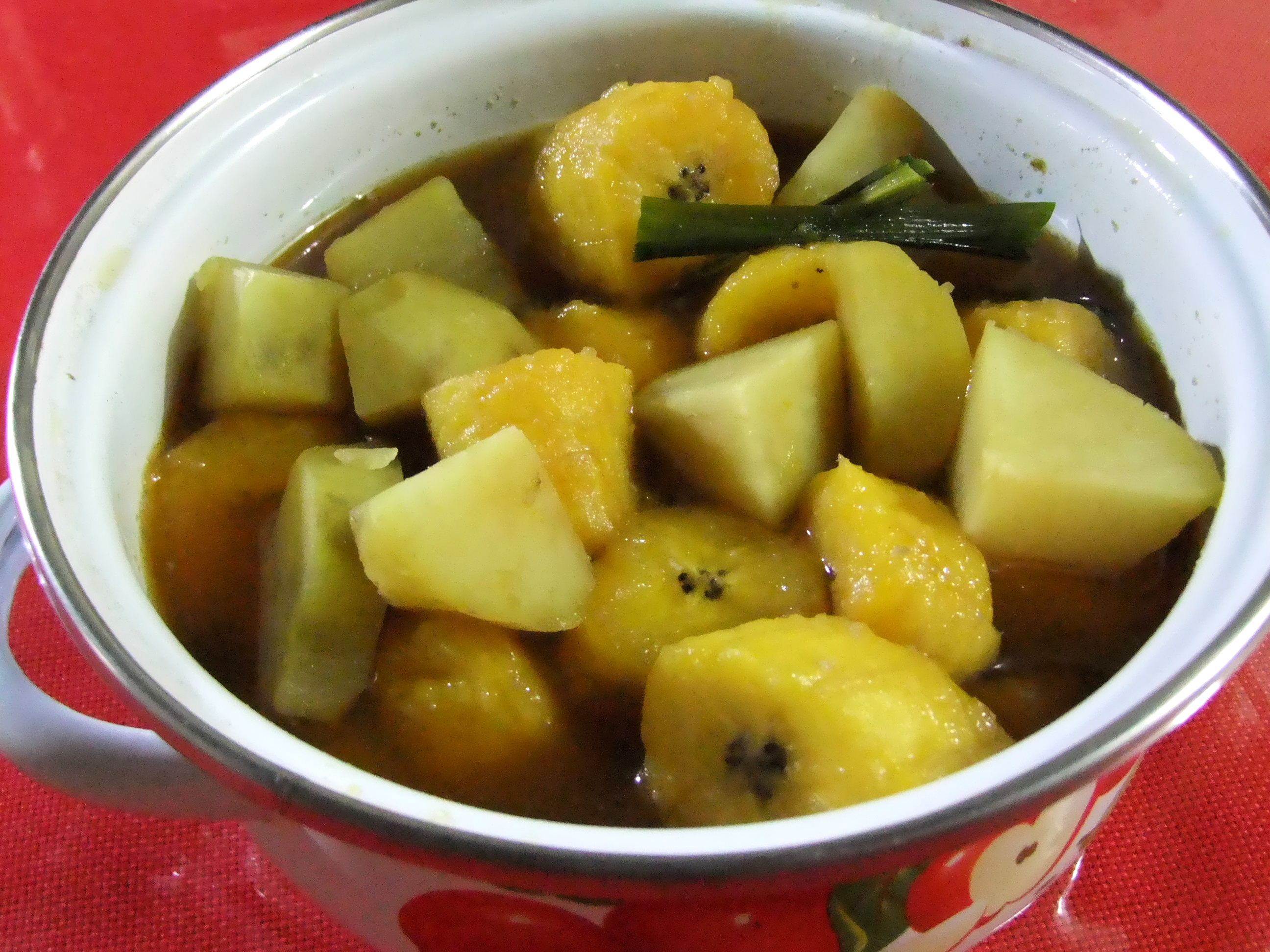 Kolak pisang dan ubi, Jakarta, Indonesia